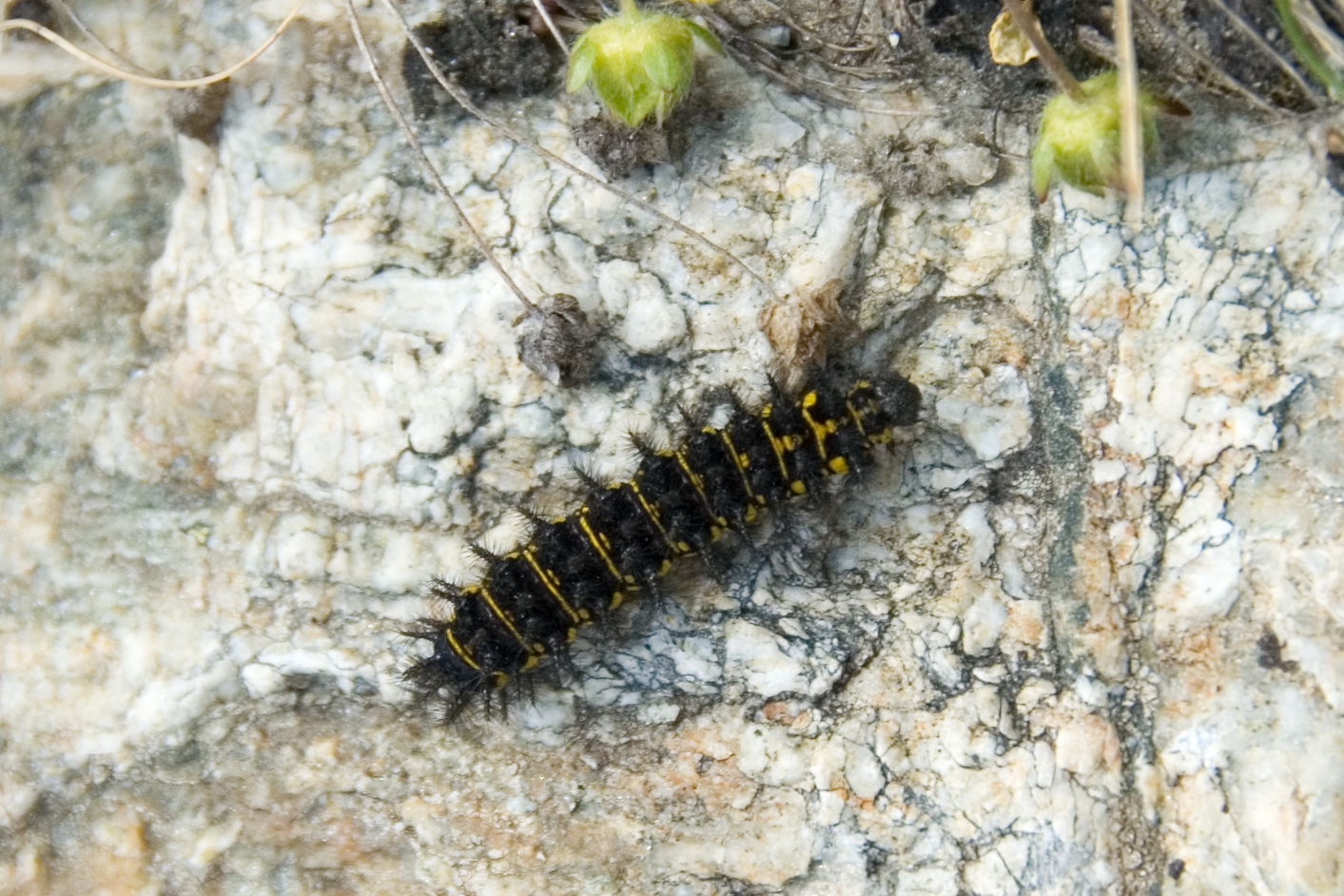 Cynthia's fritillary Euphydryas cynthia larva